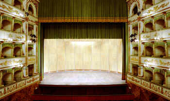 Il palcoscenico del Teatro A. Bonci